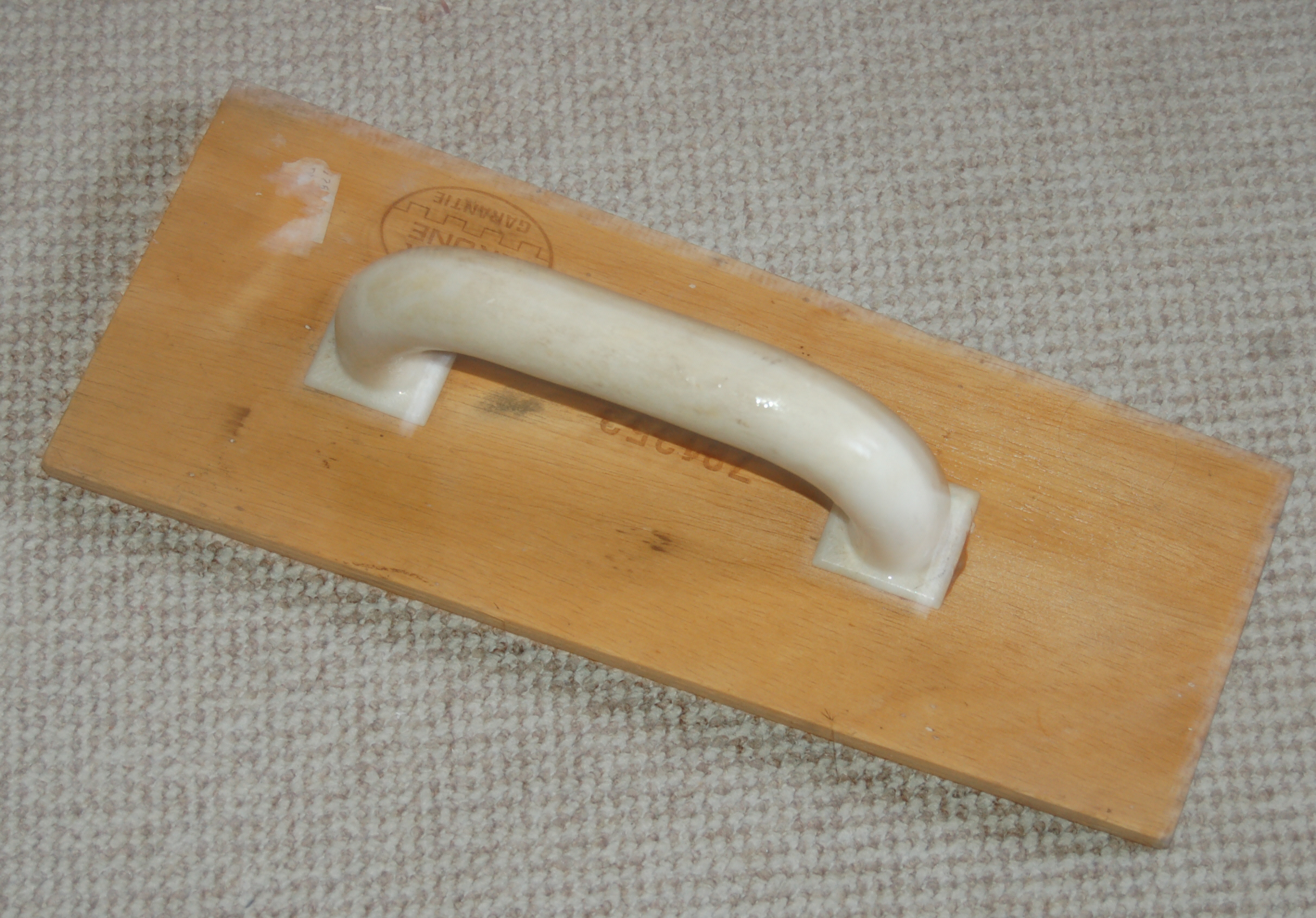 Reibebrett zum Glätten von Putzwänden